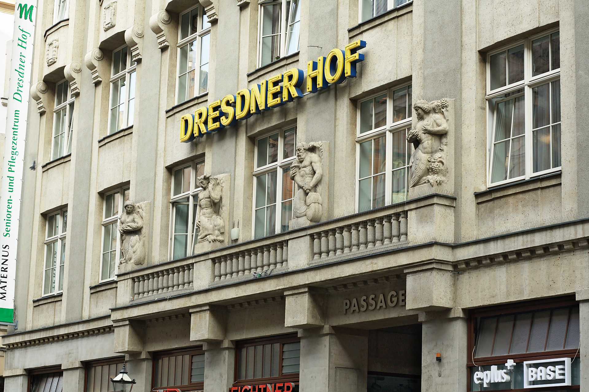 Detail Fassade Dresdner Hof